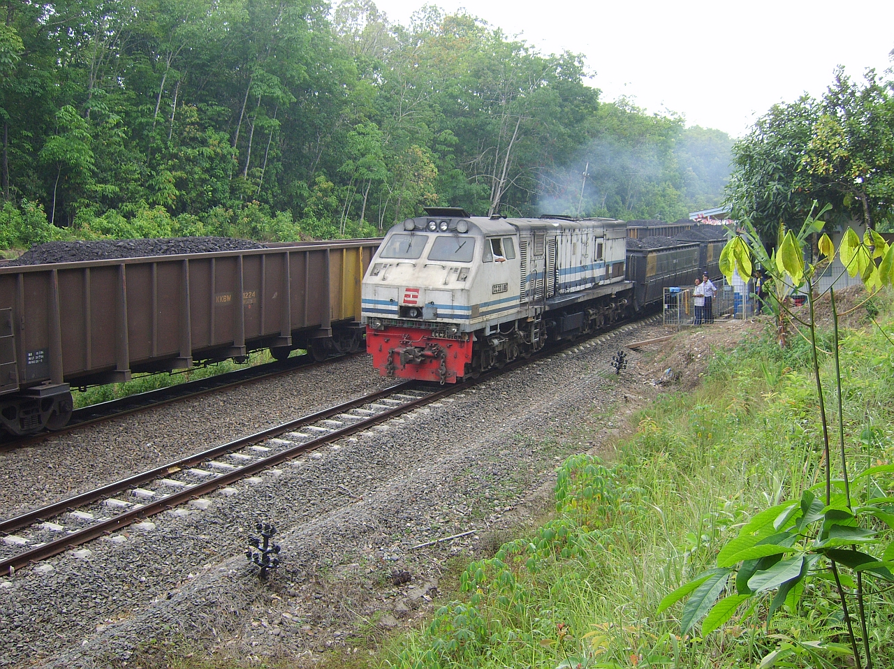 PTKACC201 (201 086 A)